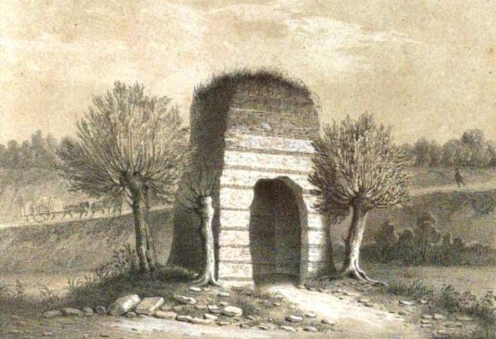 Dessin de la tour de Grisset par Gervais Launay in Histoire archéologique du Vendômois (J. de Pétigny, 1849)